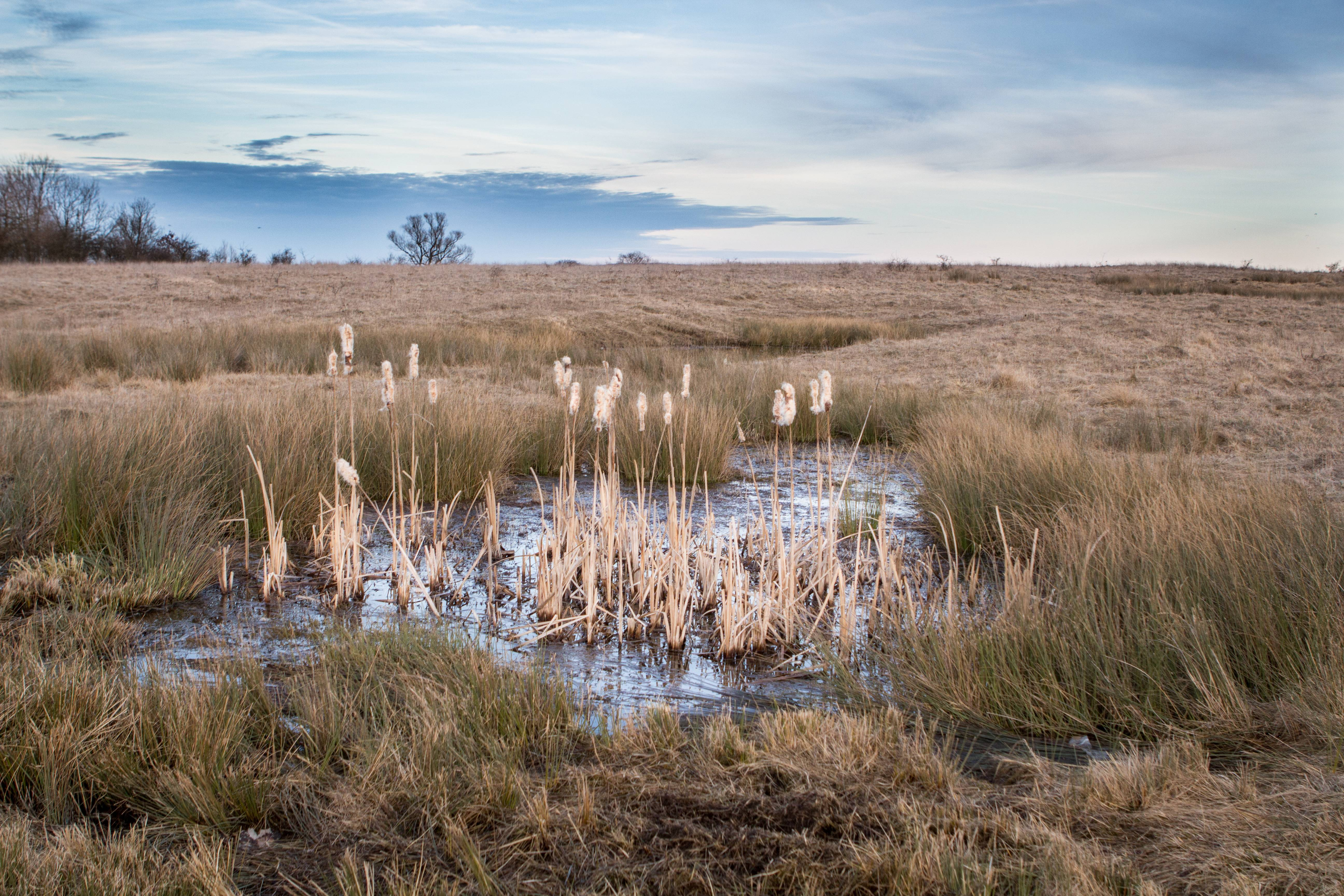 Wilder Tümpel am Rande des Naturschutzgebiets Windknollen zwischen Cospeda und Closewitz bei Jena